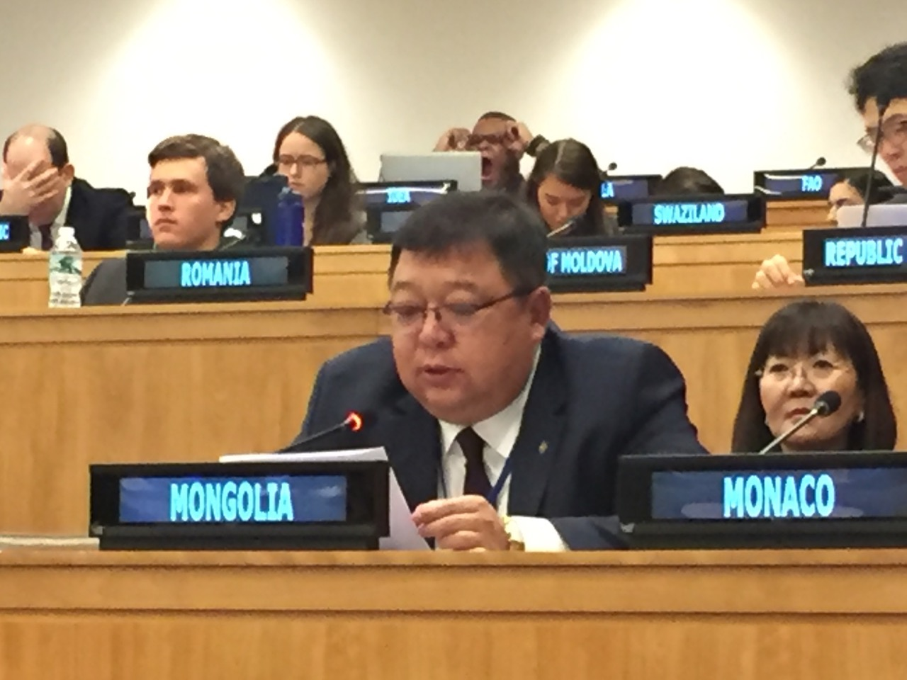 Монгол: 2015 оны 10 дугаар сарын 7-ны өдөр НҮБ-ын Ерөнхий Ассамблейн 70 дугаар чуулганы 3 дугаар хорооны Нийгмийн хөгжлийн асуудлаарх хуралдаанд Хүн амын хөгжил, нийгмийн хамгааллын сайд С.Эрдэнэ үг хэлэв.